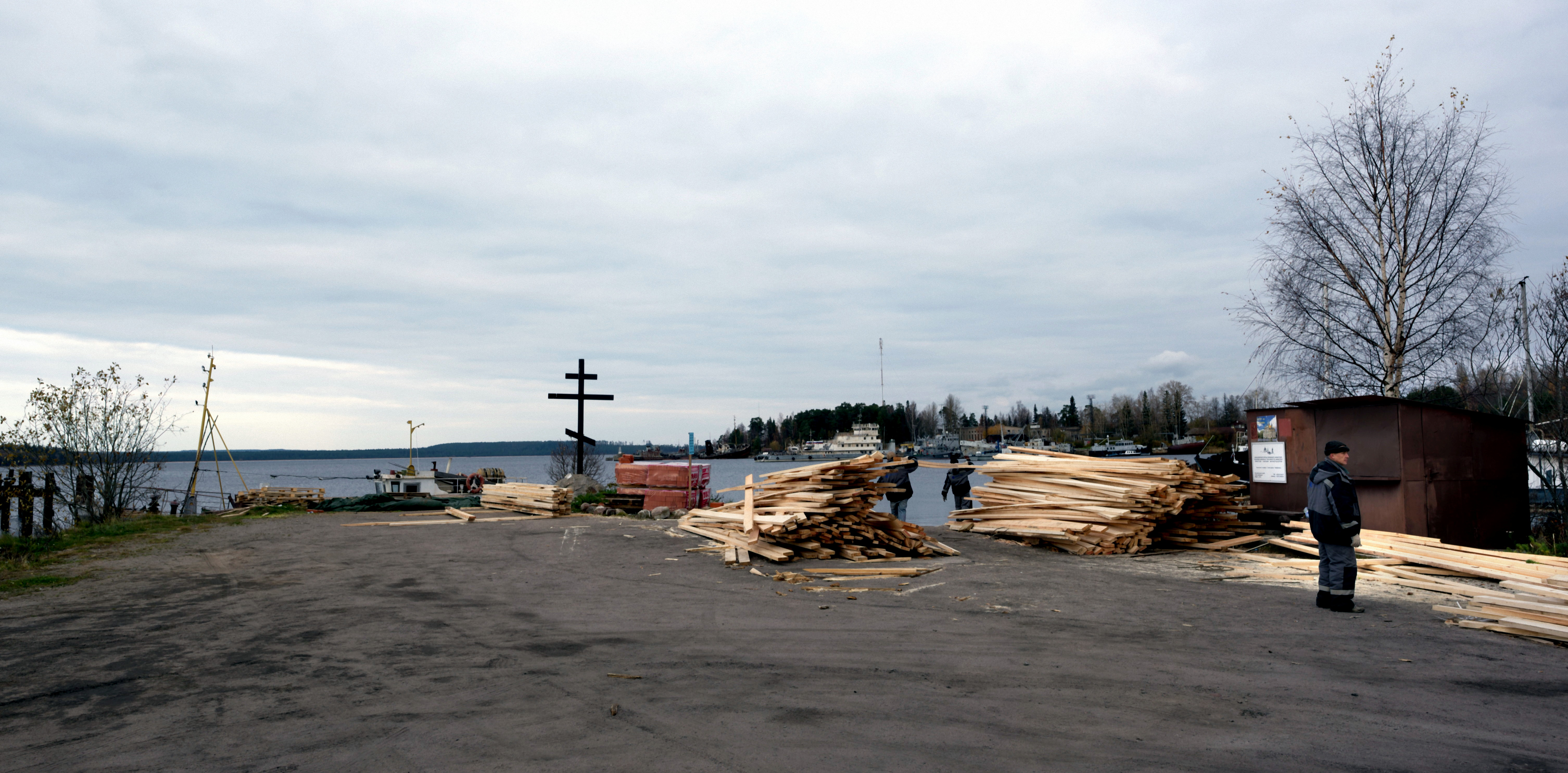 Sortanlahti, Pyhäjärvi